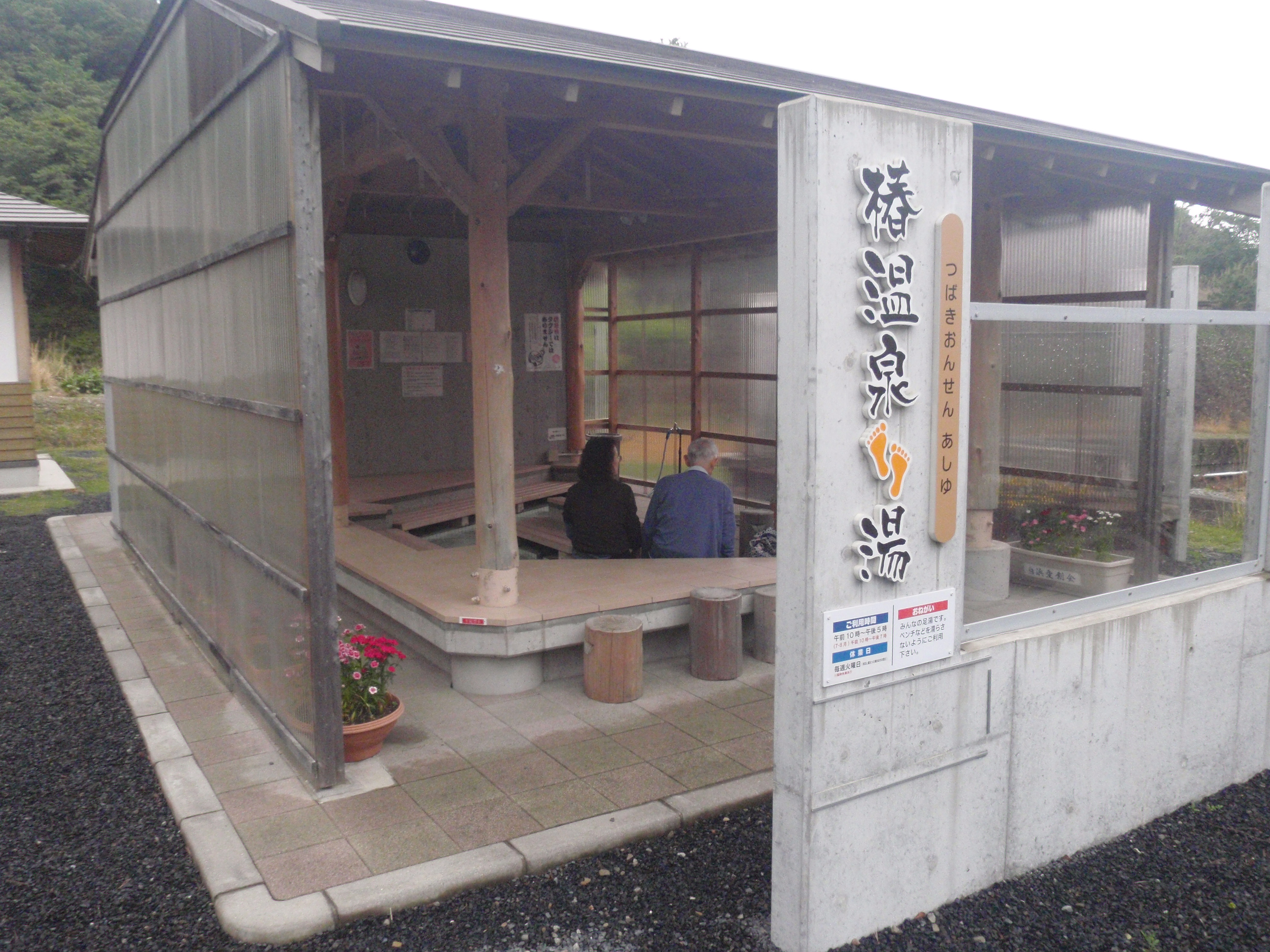 道の駅｢椿はなの湯｣の無料足湯